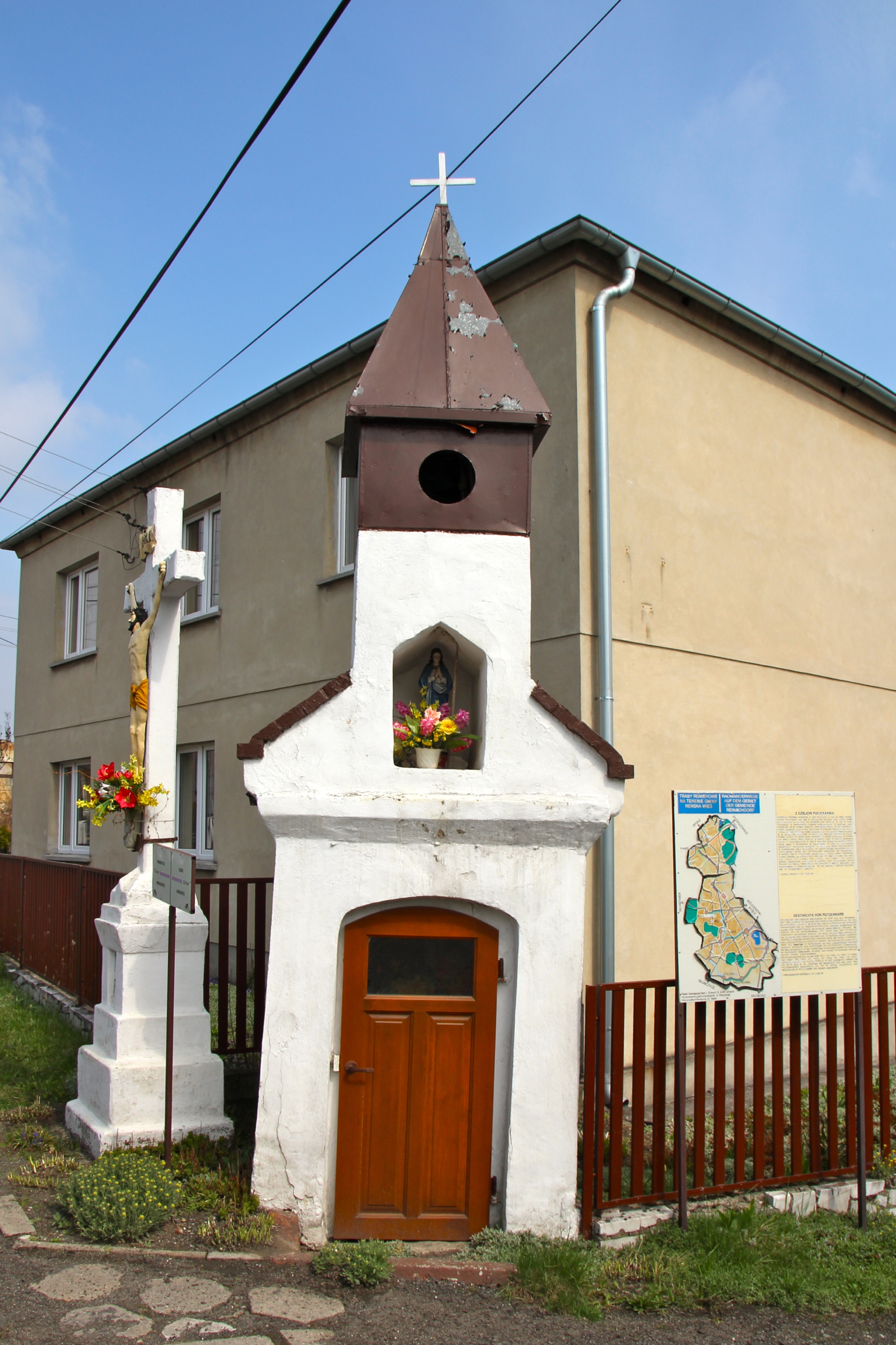 Pociękarb, (dodatkowa nazwa w j. niem. Potzenkarb), – wieś w Polsce w województwie opolskim, w powiecie kędzierzyńsko-kozielskim, w gminie Strzeleczki.